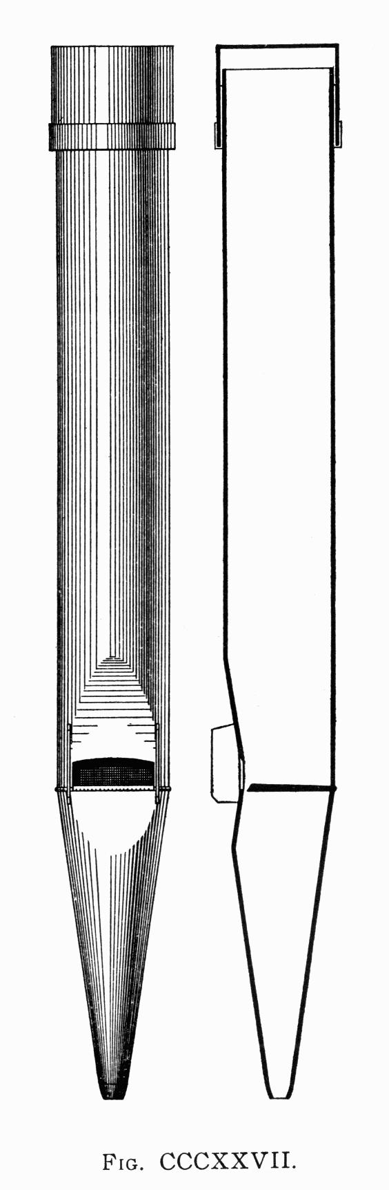 Bourdon - orgonaregiszter